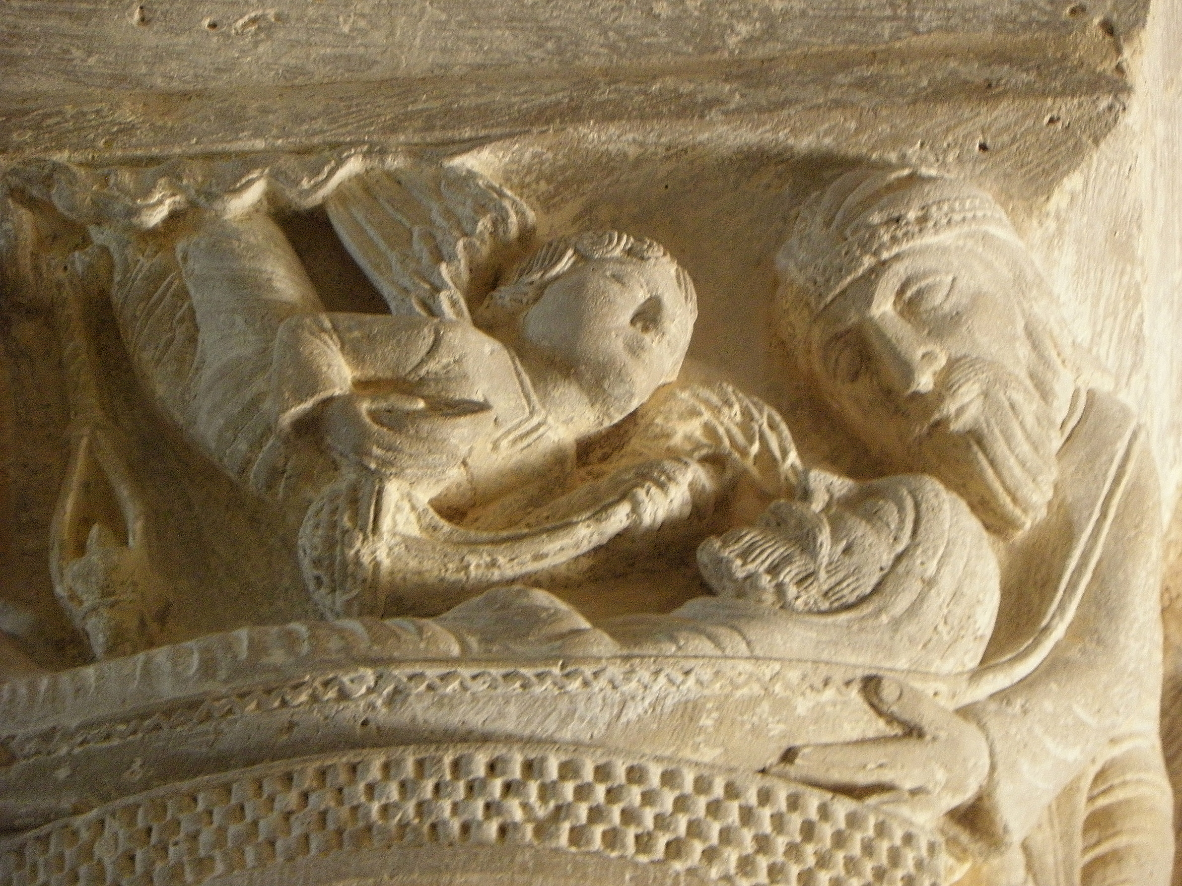 Église Saint-Pierre de Melle (79). Intérieur. Chapiteau.